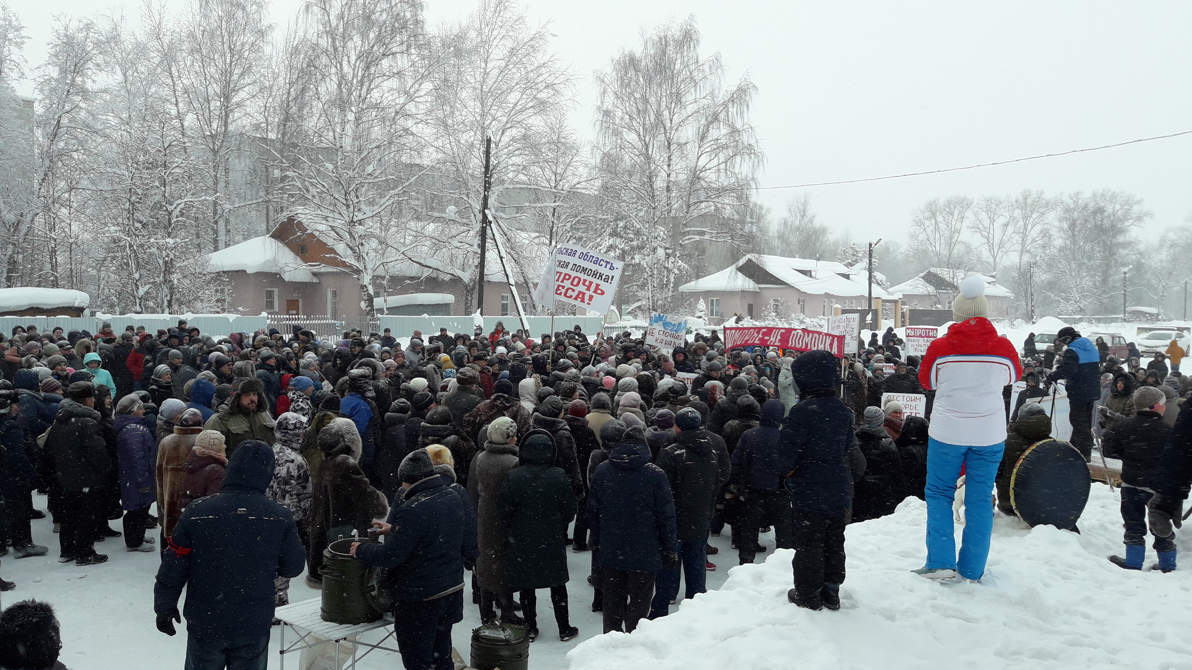 День всероссийского экопротеста. Коряжма